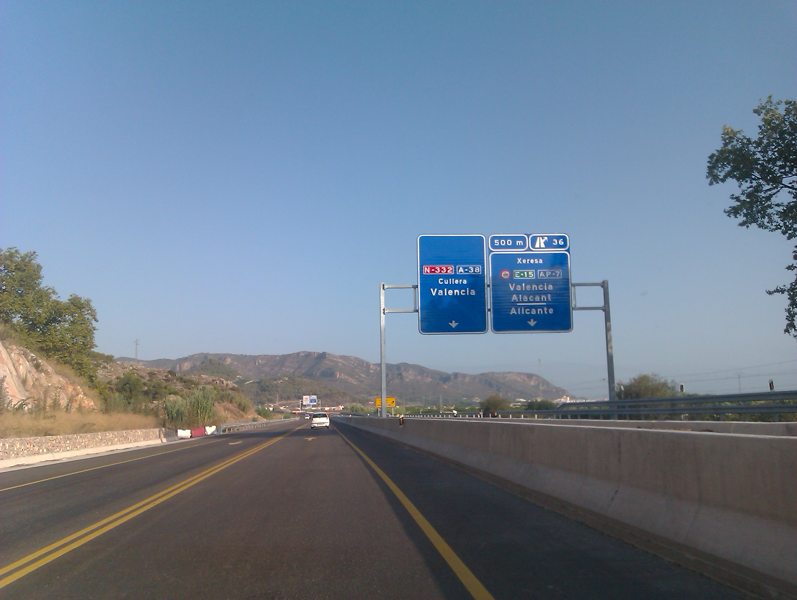 Autovia A-38 - Obres a la variant de Gandia-Xeresa